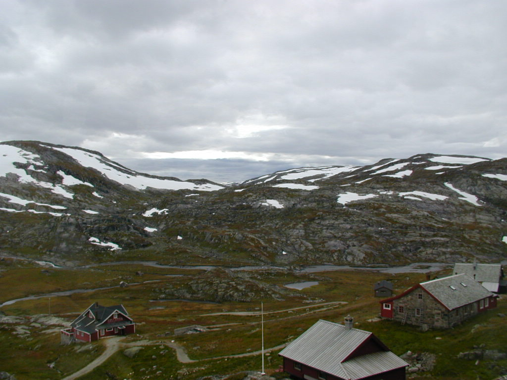 Hallingskeid